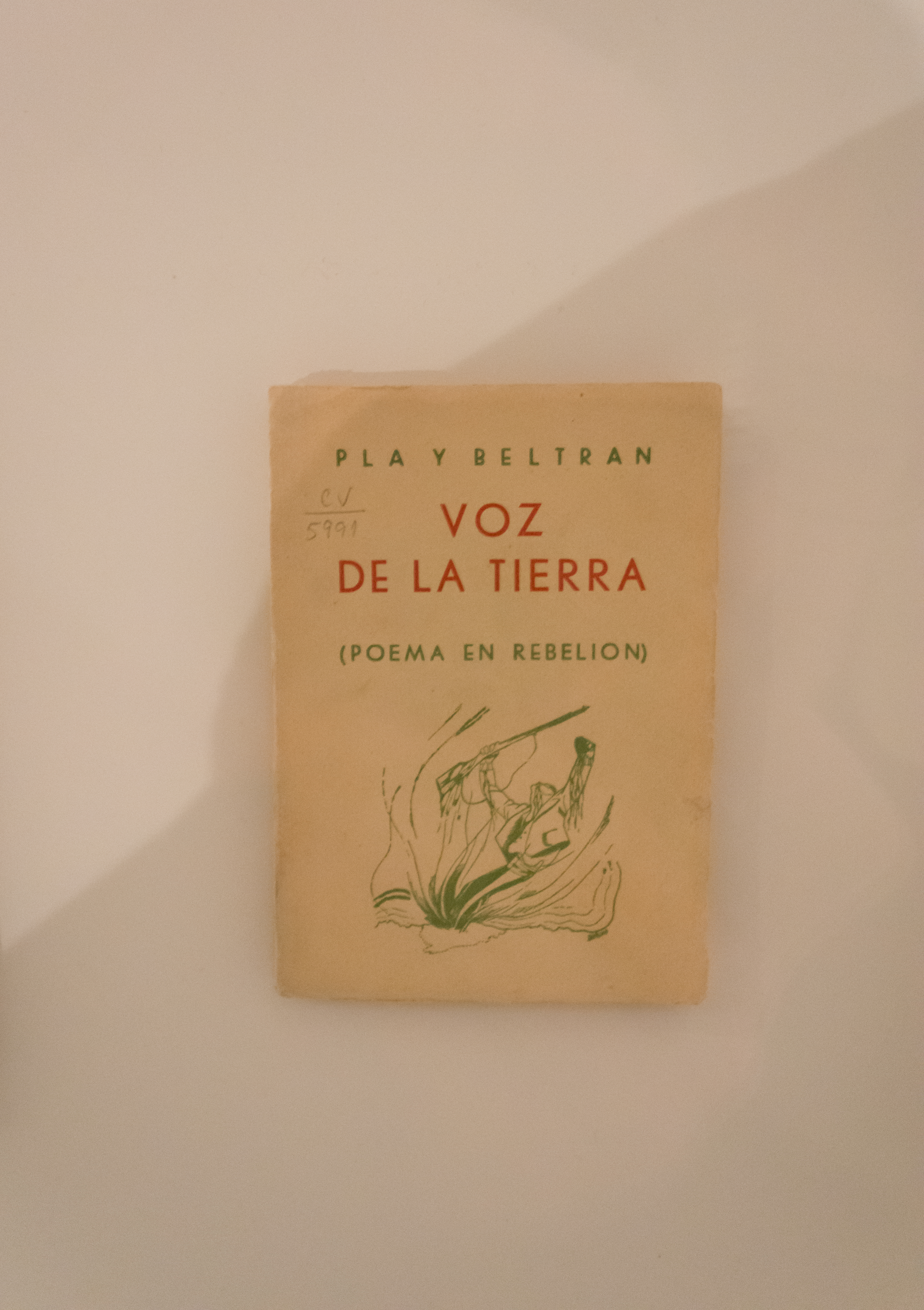 Voz de la tierra, libro de Pascual Pla y Beltrán. Exposición Por la defensa de la Cultura en el Centro del Carmen de Valencia.